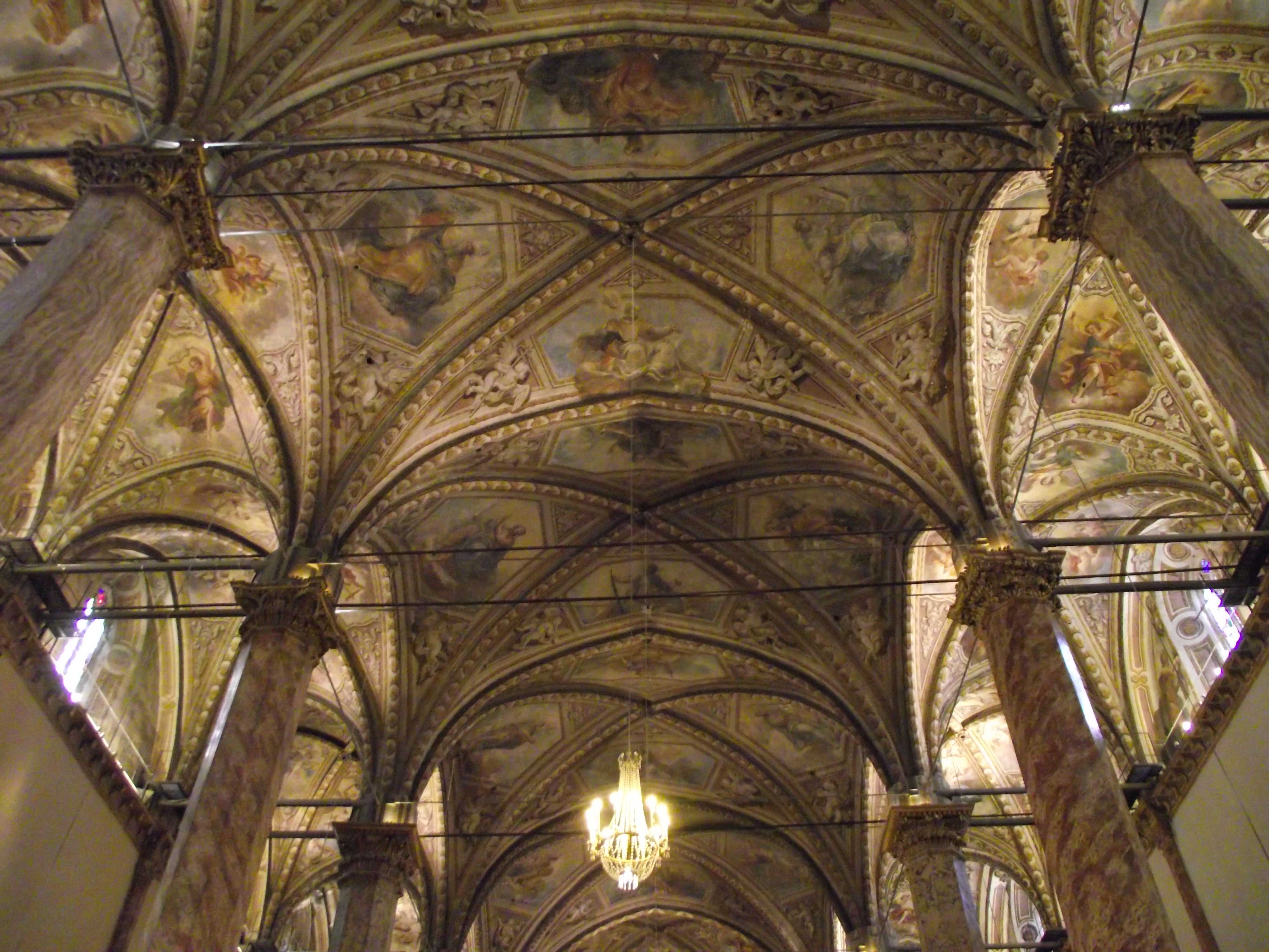 Perugia, Interno del Duomo